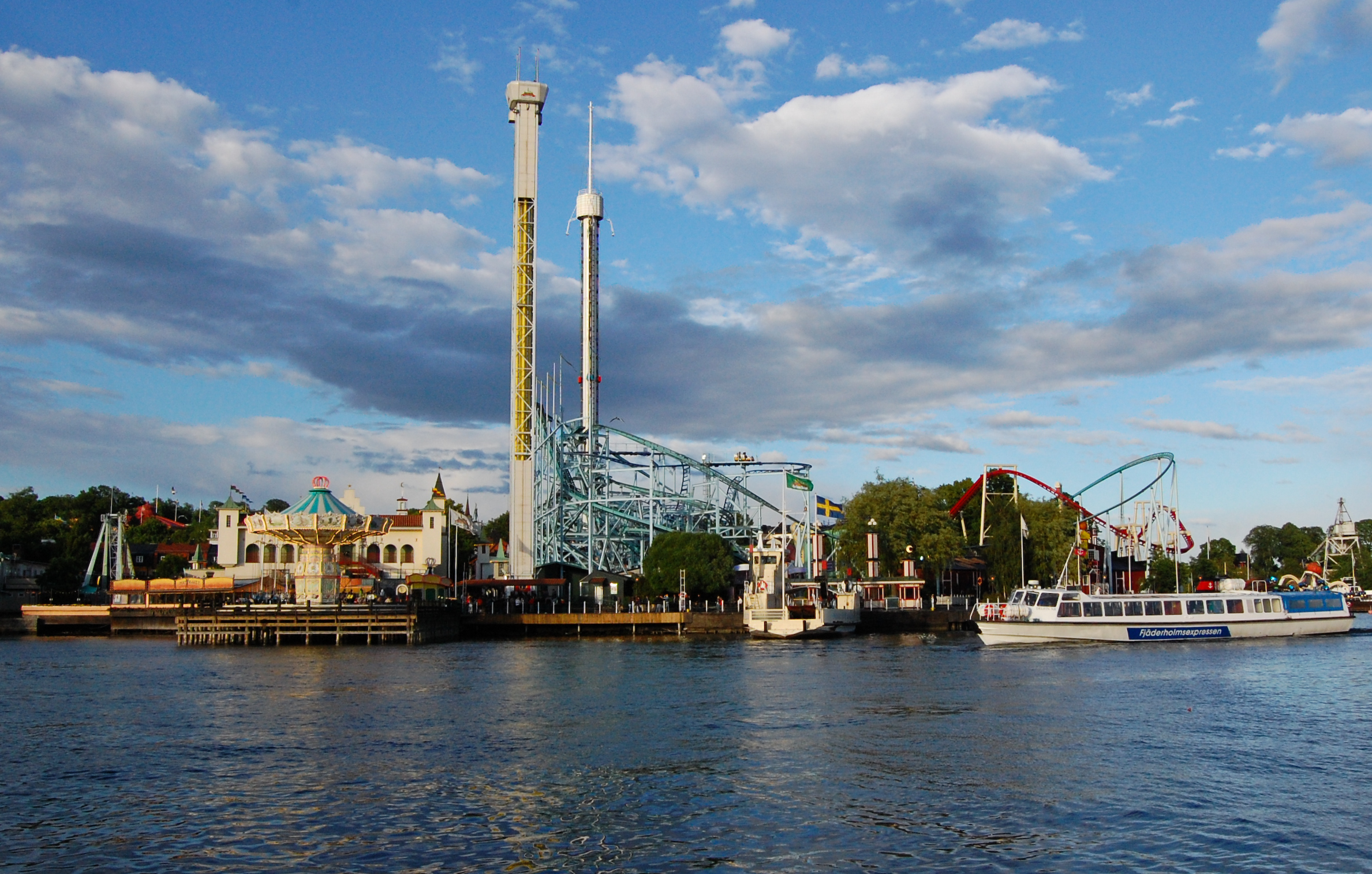 Vy över Gröna Lund tagen från Djurgårdsfärjan.